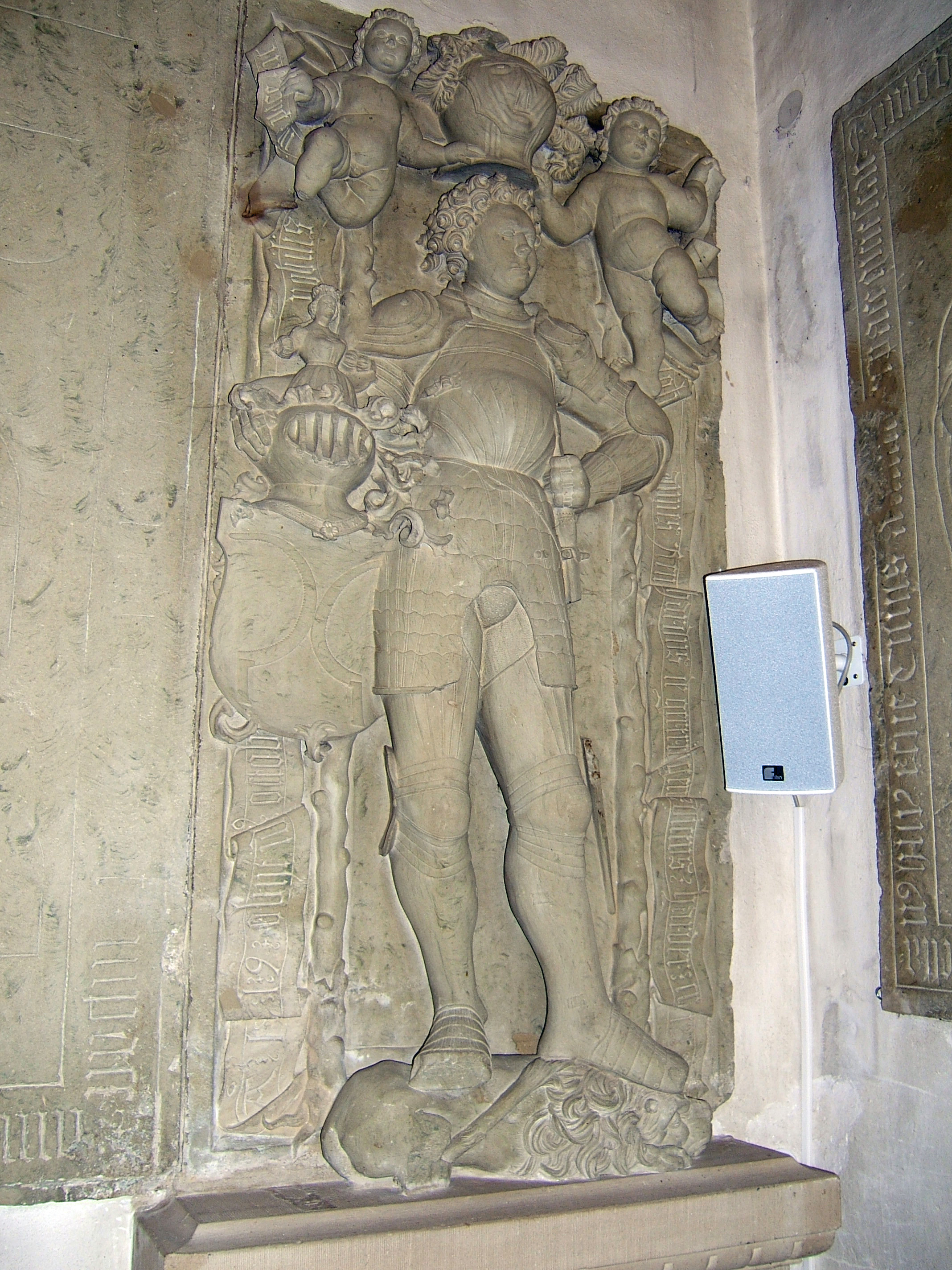 St.-Veit-Kirche Gärtringen, Grabdenkmal des Johann Renhard von Gärtringen, genannt Harder, gest. 15. Oktober 1519